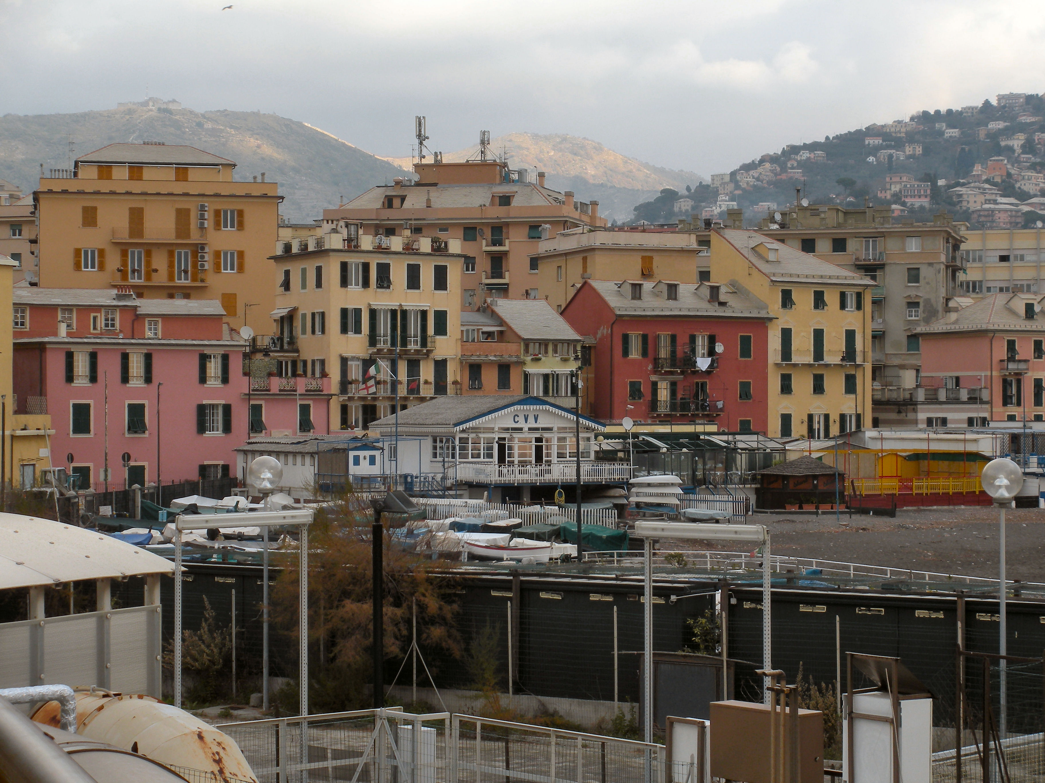 Genova, il borgo marinaro di Sturla (Vico del Pesce)